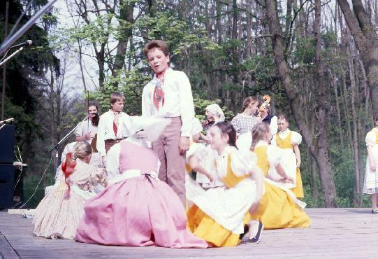 Hořeňáček